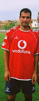 (Imagen recortada y rotada 5 grados) El entrenador y jugador de fútbol Josep Guardiola